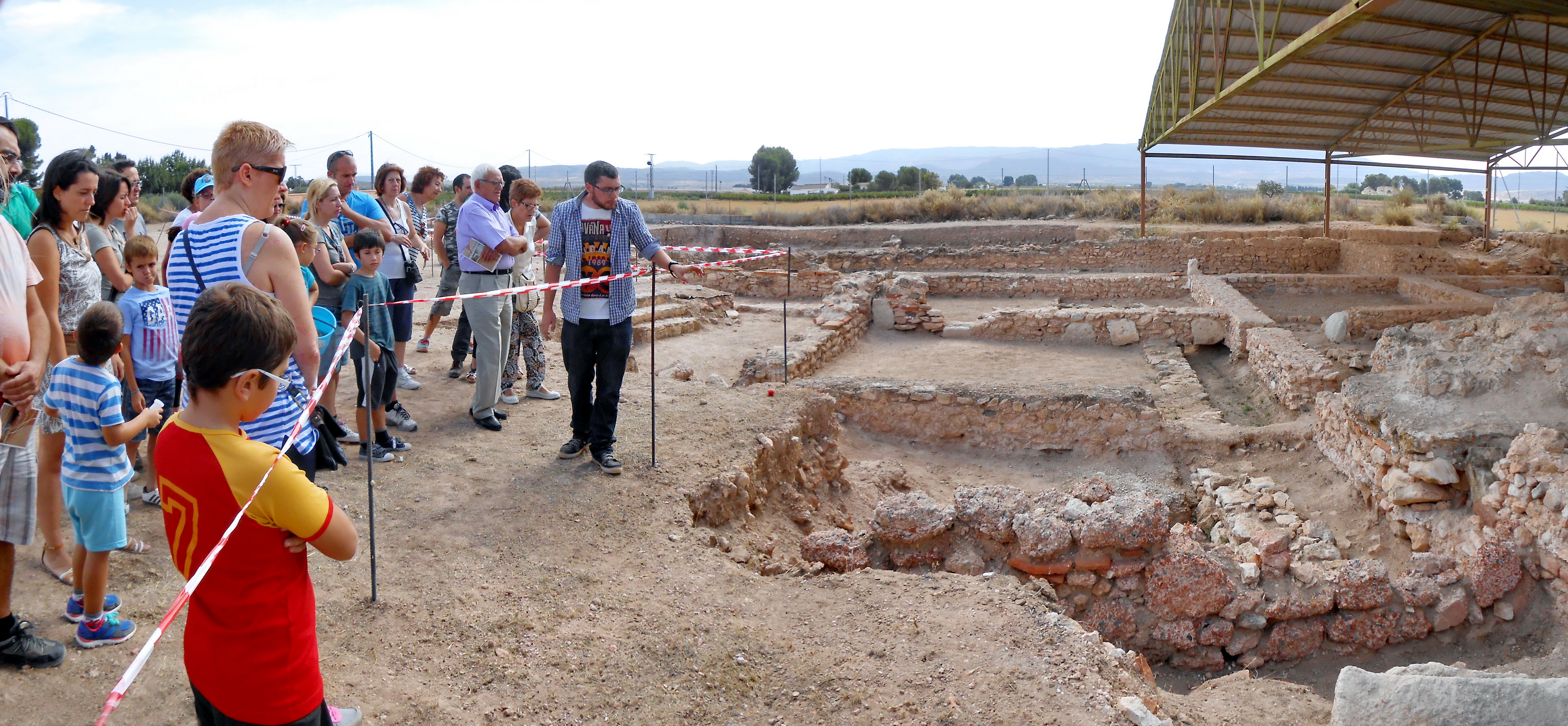 Los Torrejones Yecla, Murcia